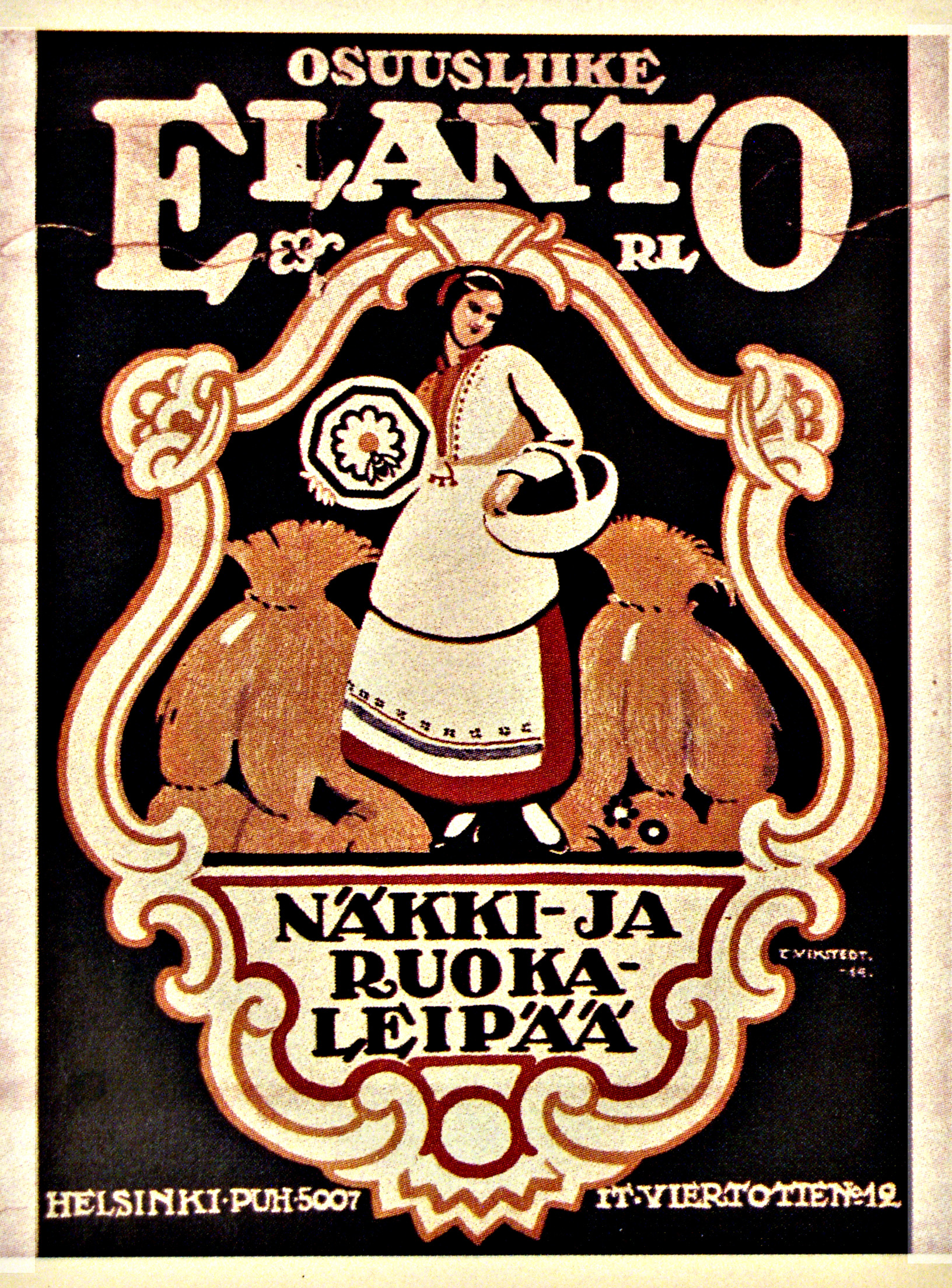 Topi Vikstedtin piirtämä Elannon leipäjuliste vuodelta 1914